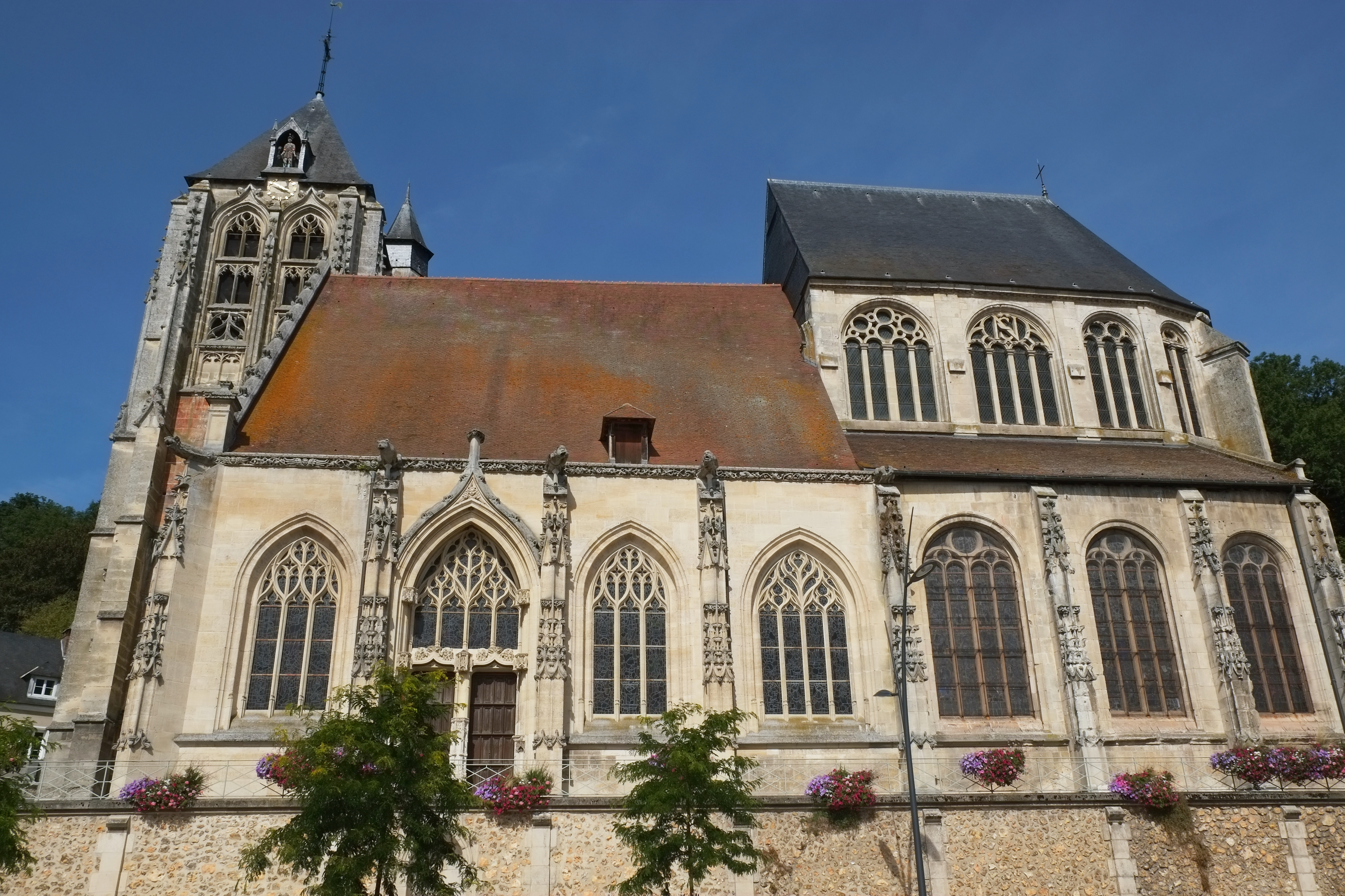 Kirche Saint-Nicolas in Beaumont-le-Roger im Département Eure (Frankreich)